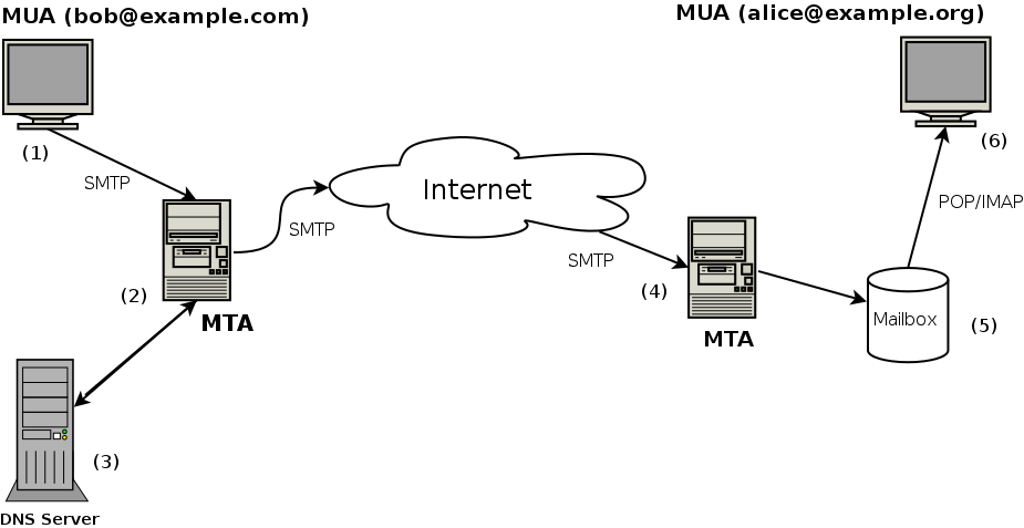 نحوه ارسال و دریافت یک ایمیل. این تصویر توسط برنامه dia طراحی شده است. همچنین این تصویر قبلا در دانشنامه بی‌اس‌دی هم استفاده شده بود. (توسط خودم)